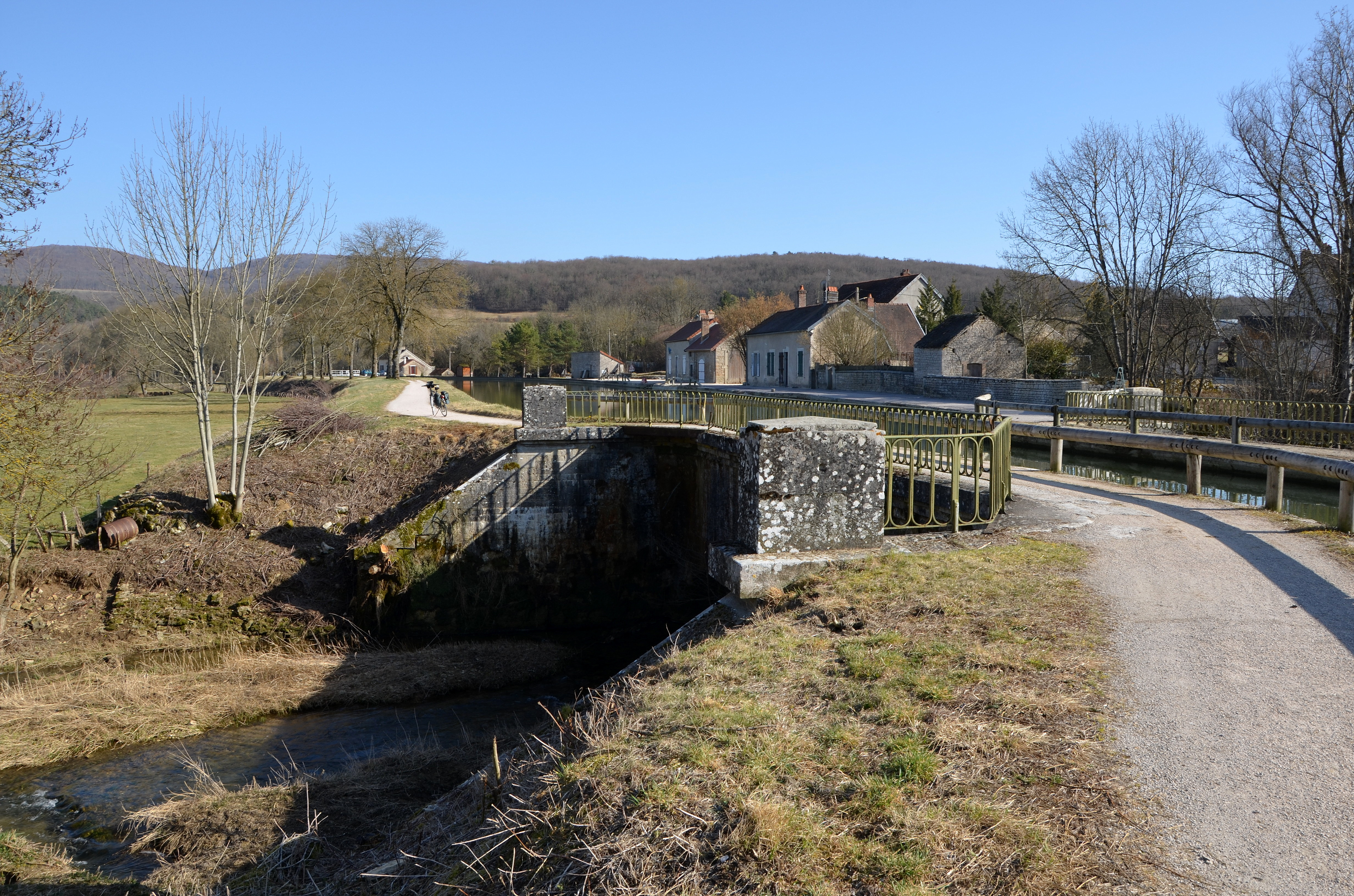 Canal de Bourgogne au Pont d'Ouche, Cote d'Or, Bourgogne, France